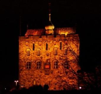 Rosenkrantztårnet in Bergen in Norway.